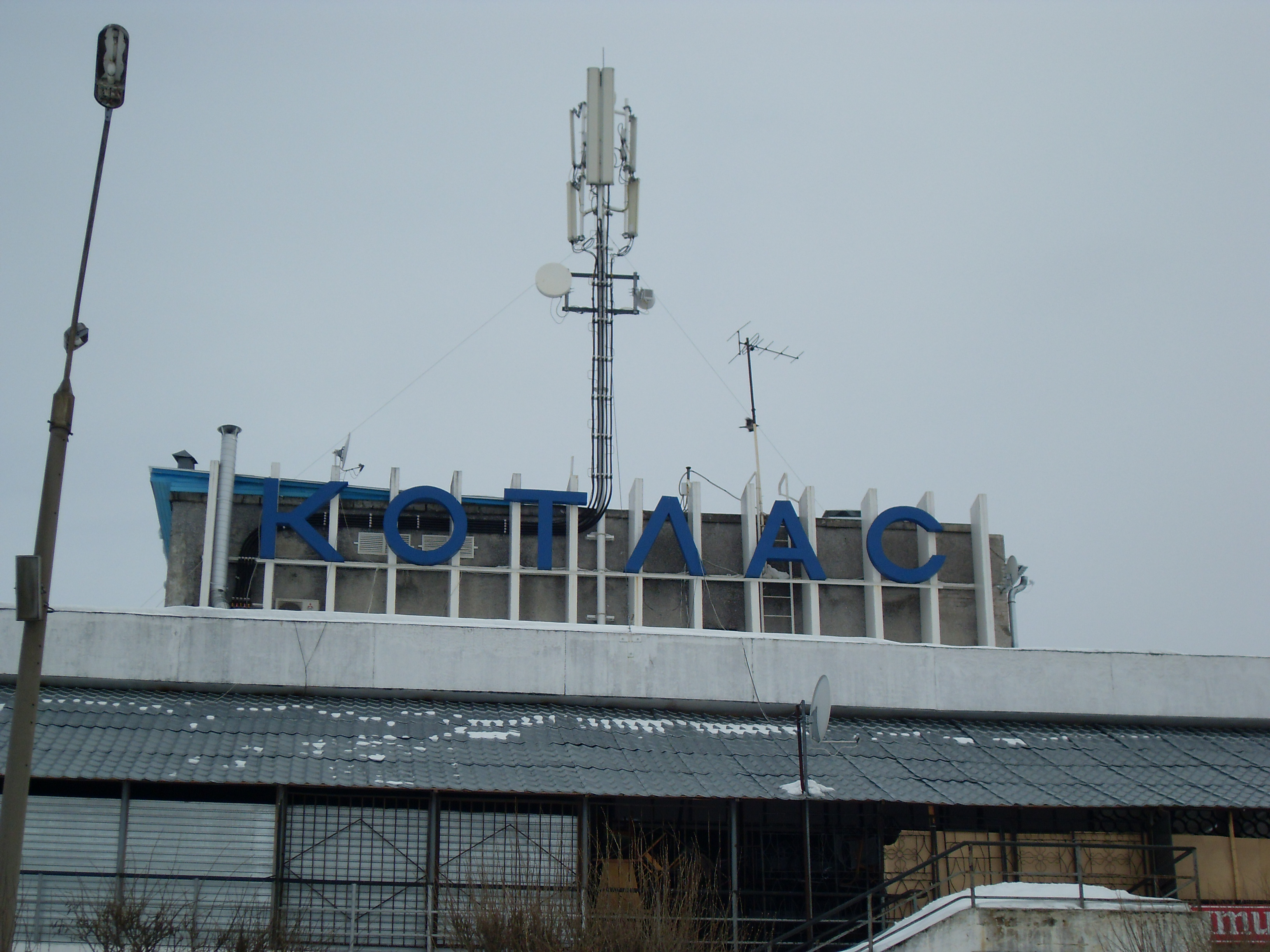 Бывший речной порт Котласа